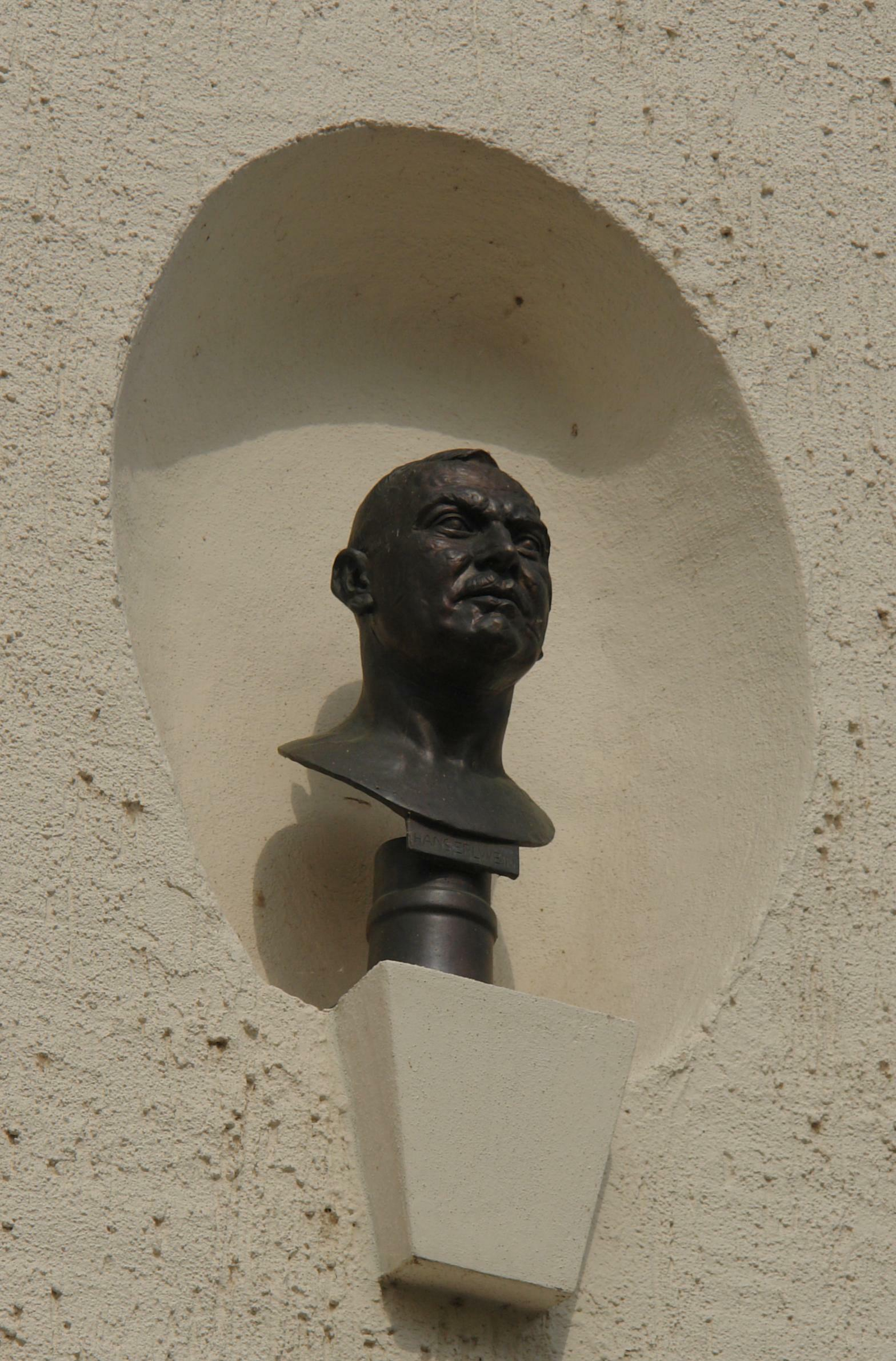 Büste von Hans Erlwein geschaffen von Georg Wrba, Nachguss von 2007, am Städtischen Vieh- und Schlachthof Dresden am Gebäude Messering 3. Inschrift: Hans Erlwein